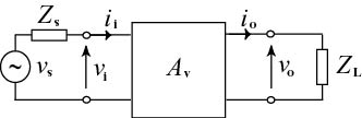 Spenningsforsterkar